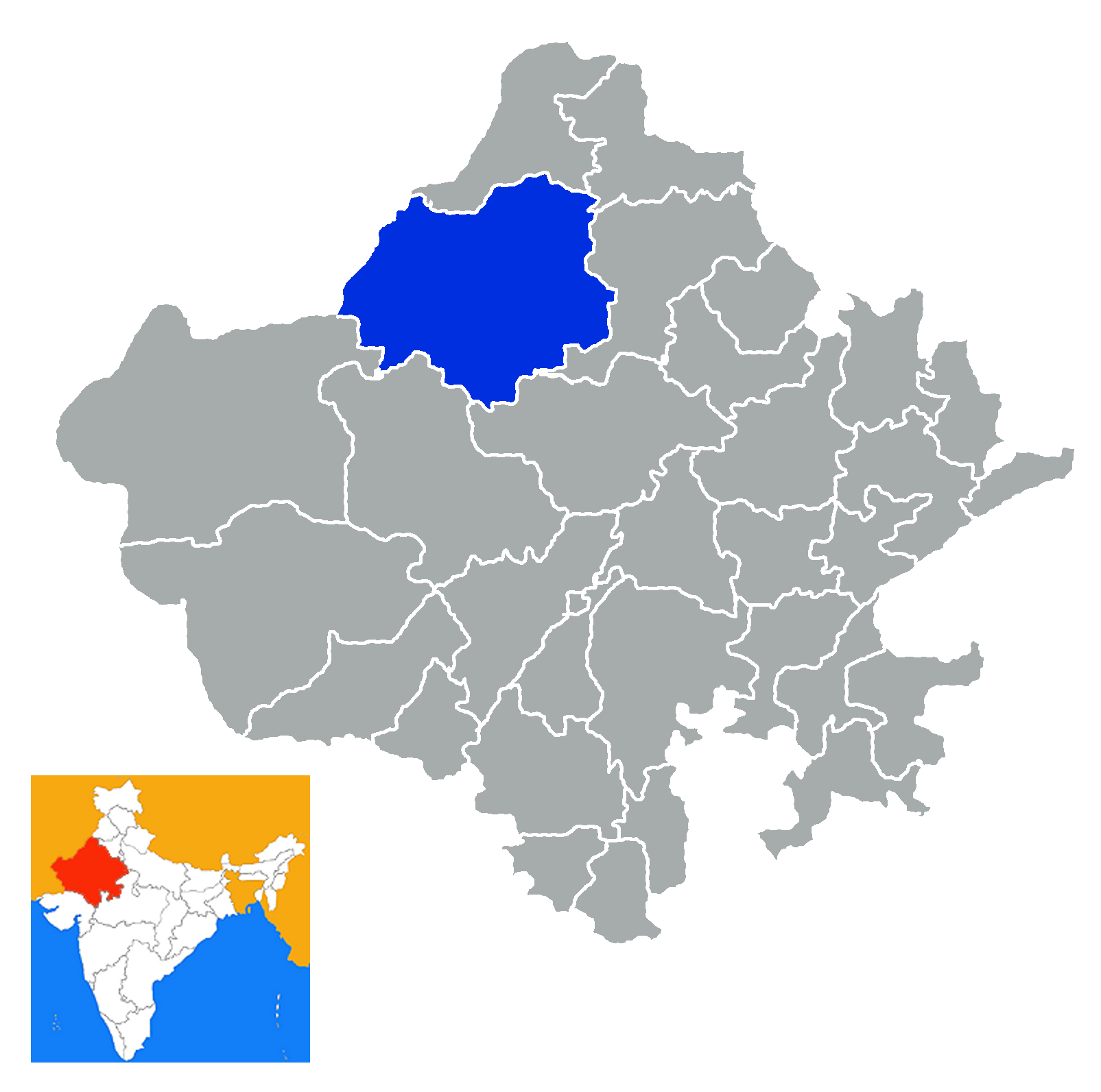 Distrito de Bikaner Rajastan India